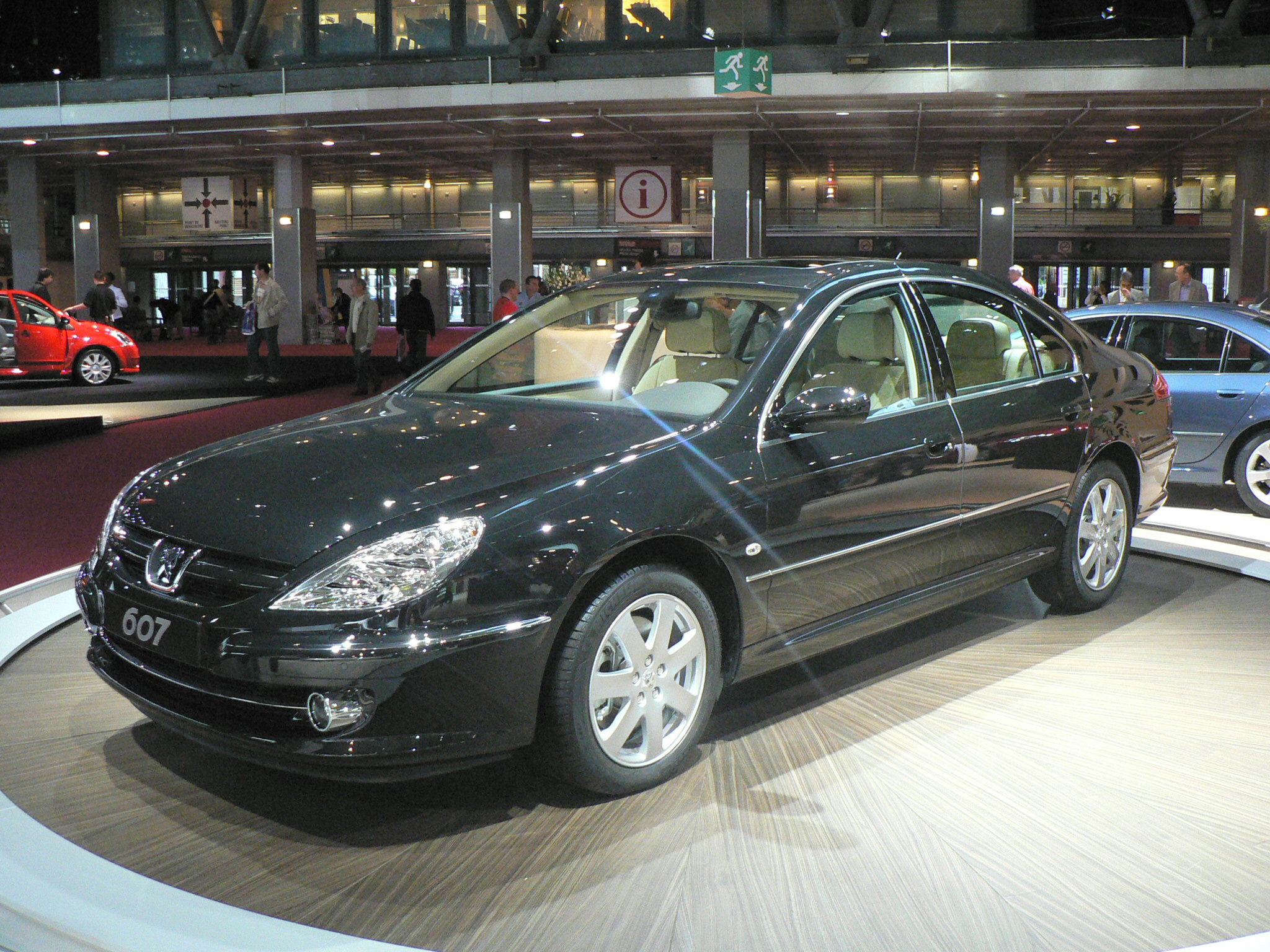 Mondial de l'automobile, Paris 2006